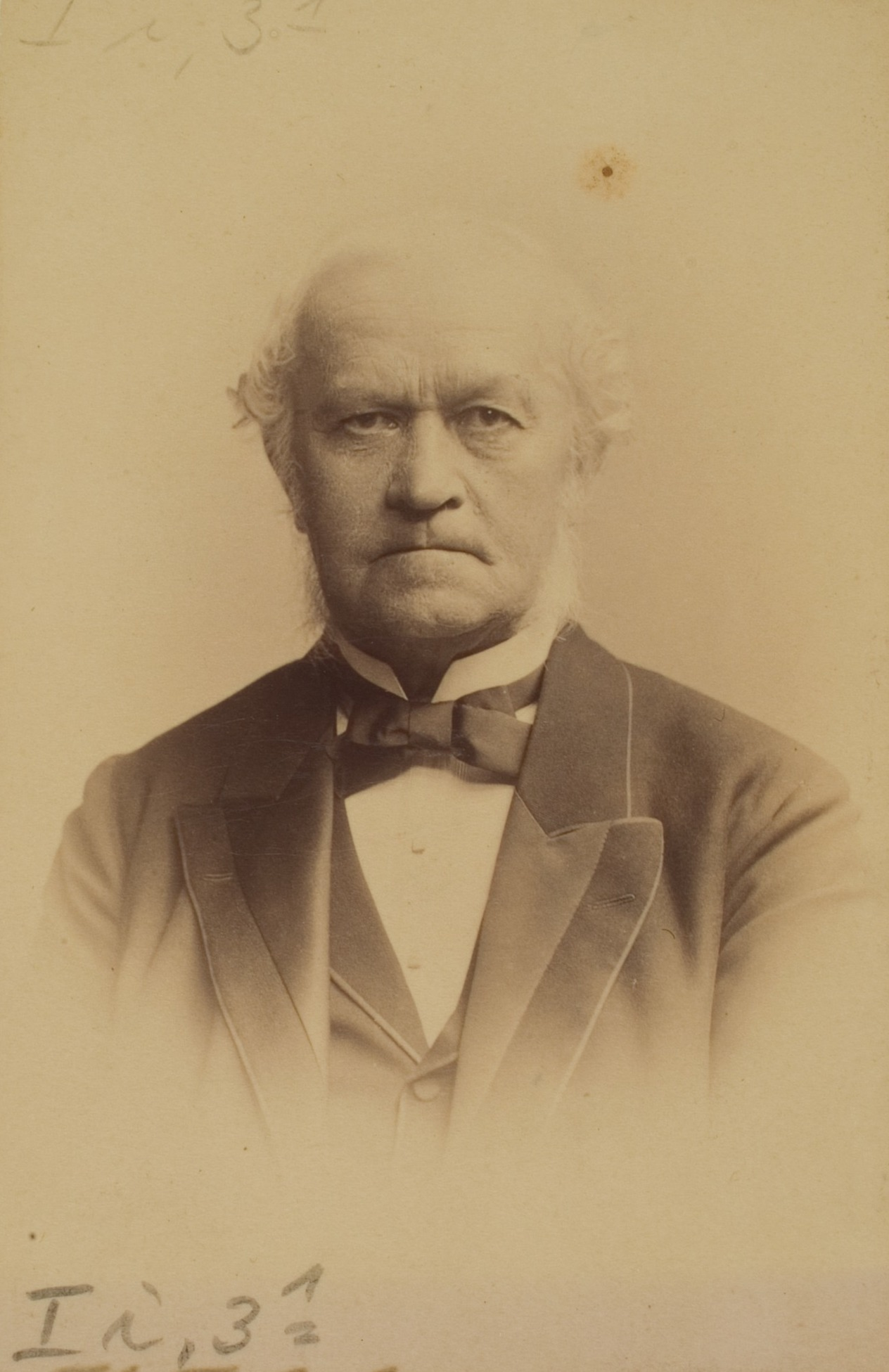 Joseph Anton Friedrich Wilhelm Ihne, Anglist 1873–1901 Professor in Heidelberg